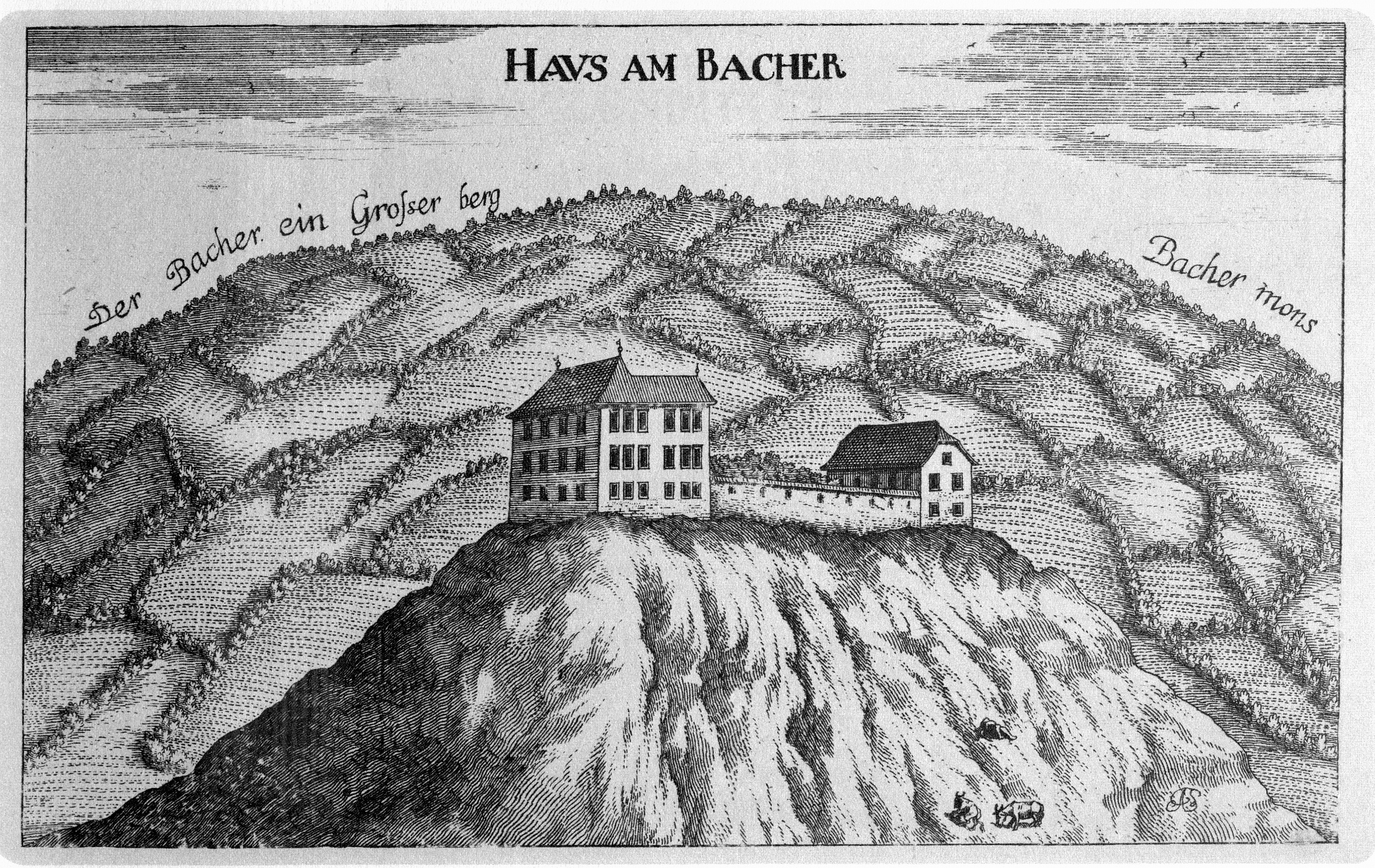 G. M. Vischers Käyserlichen Geographi, Topographia Ducatus Stiriae, Das ist: Eigentliche Delineation / und Abbildung aller Städte / Schlösser / Marcktfleck / Lustgärten / Probsteyen / Stiffter / Clöster und Kirchen / so es sich im Herzogthumb Steyrmarck befinden; Und anjetzo Umb einen billichen Preyß zu finden seynd Bey Johann Bitsch Universitäts Buchhandlern / Auff dem Juden=Platz bey der guldenen Saulen. Graz 1681 Die Nummerierung der Dateien folgt der alphabetischen Reihung der Ortsnamen